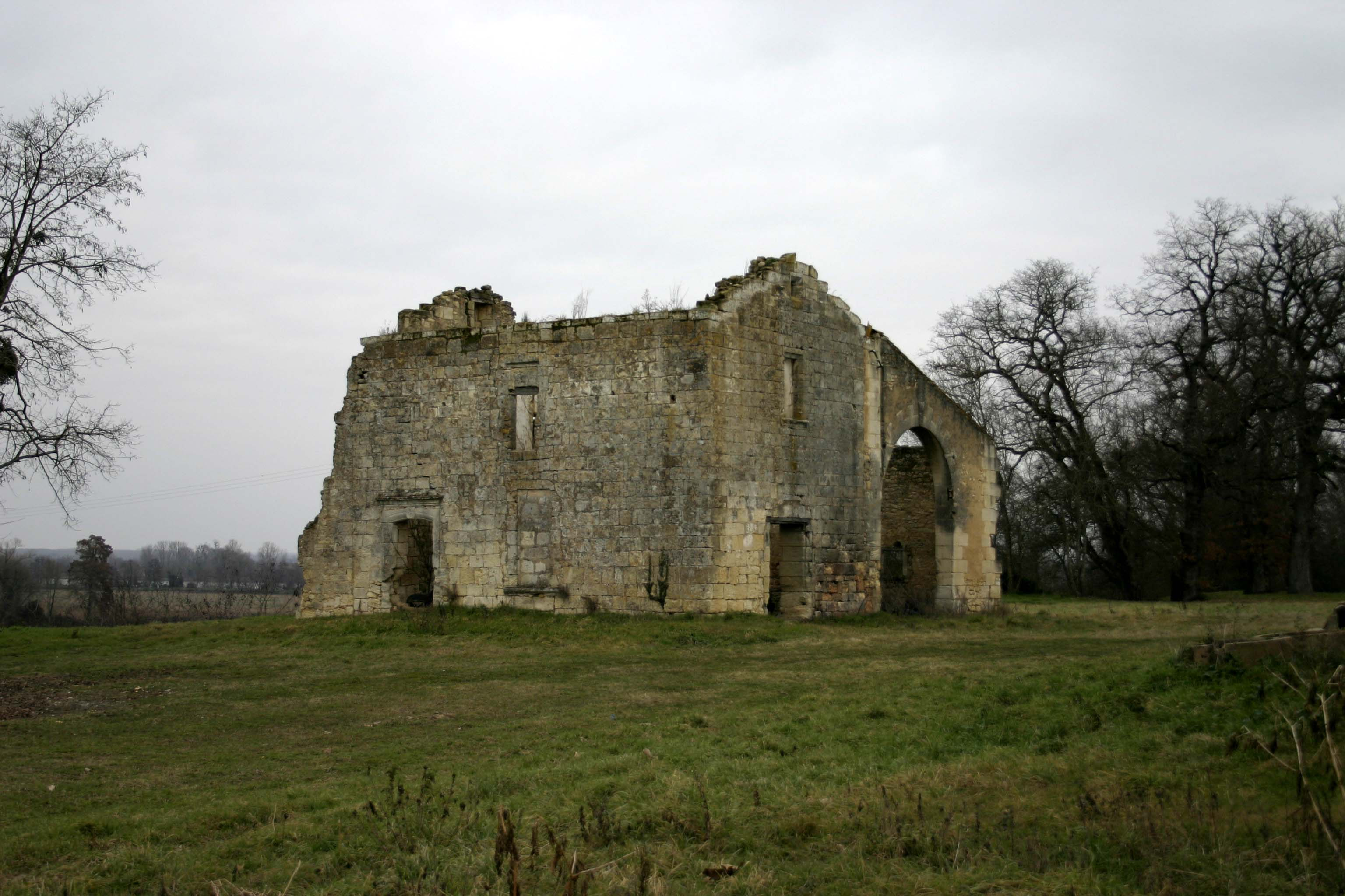 Commanderie d'Arveyres (Gironde, France) vue de côté.